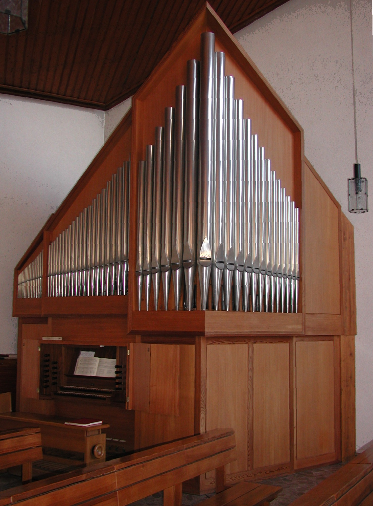 Die Orgel in der Kirche Zum Guten Hirten